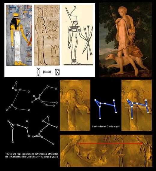 Egyptian and greeck representation of Sirius